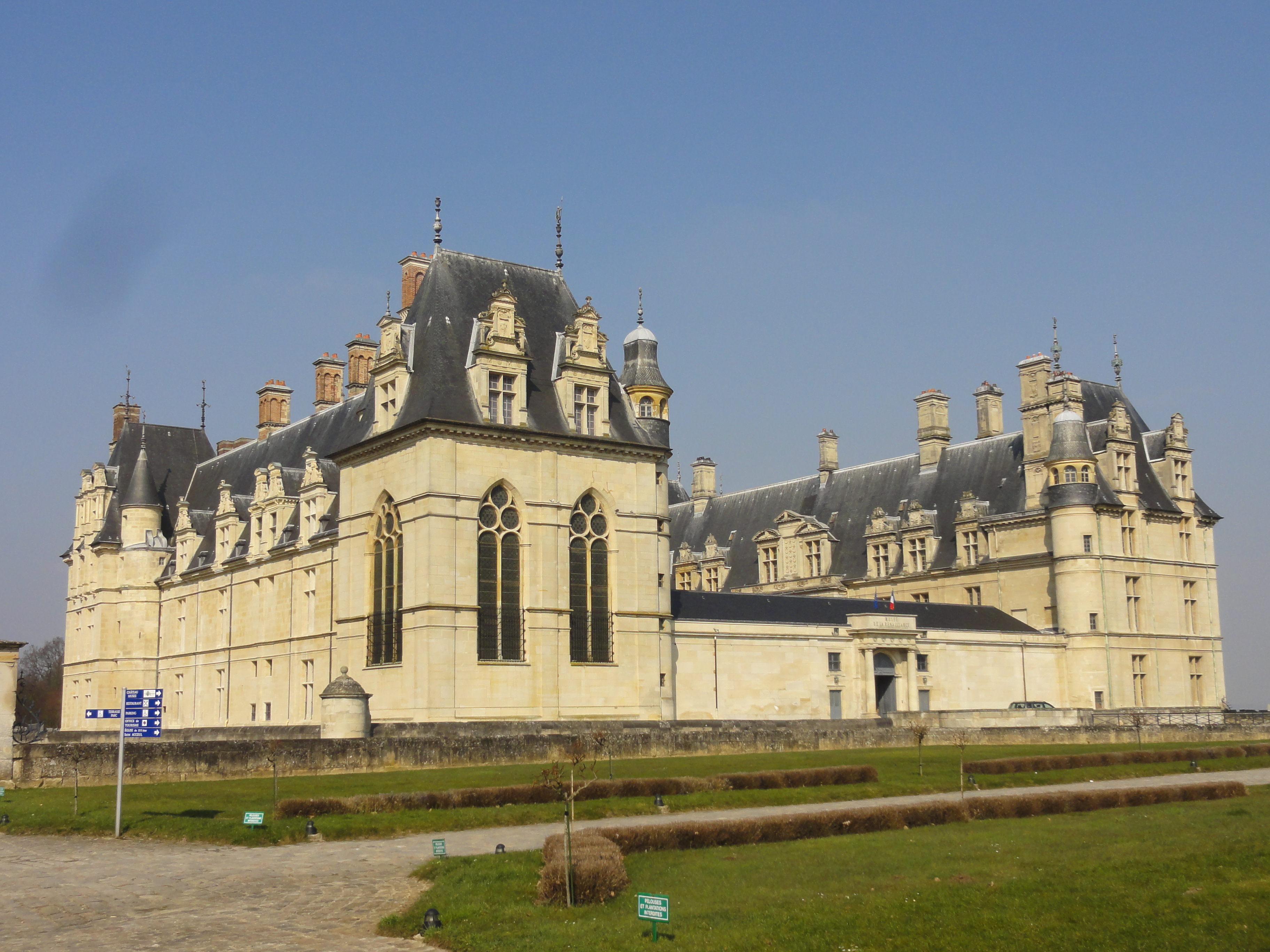 Façade est.